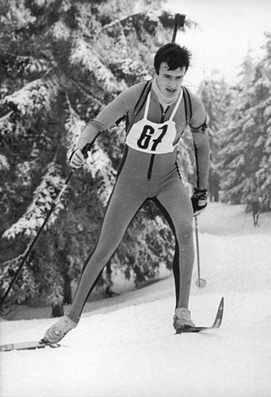 Matthias Jacob ADN-ZB Schaar 6.3.82 Lahti-Skispiele- Matthias Jacob (DDR) gewann den Biathlon-Wettbewerb über 10km bei den Salpauselkä-Skispielen in der südfinnischen Stadt Lahti. (Archivfoto)